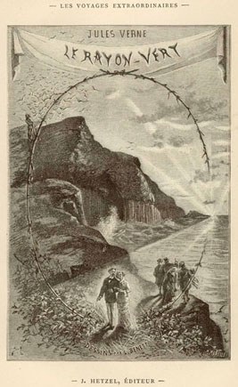 Původní ilustrace Léona Benetta k románu J. Verna